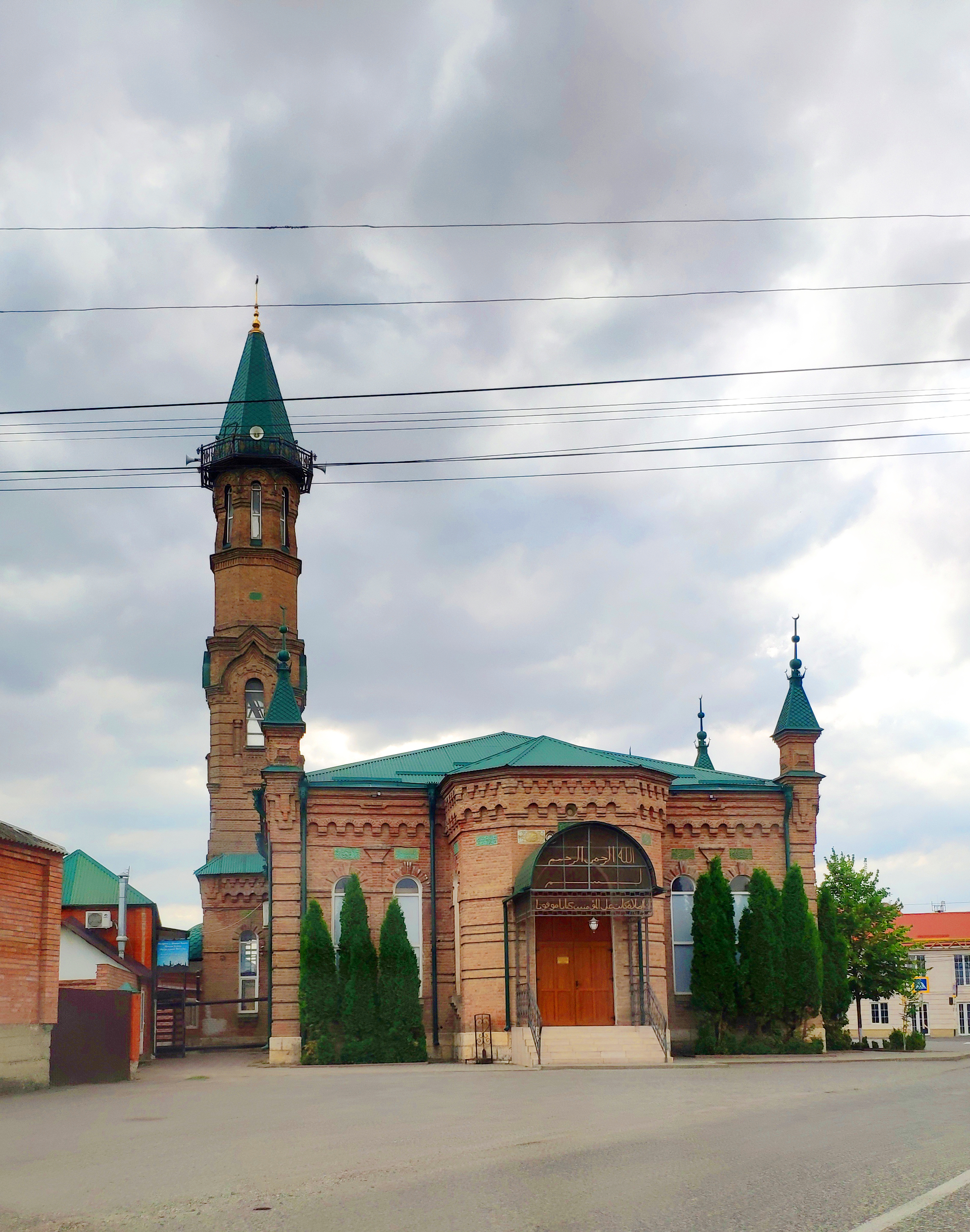 Мурад Доддо